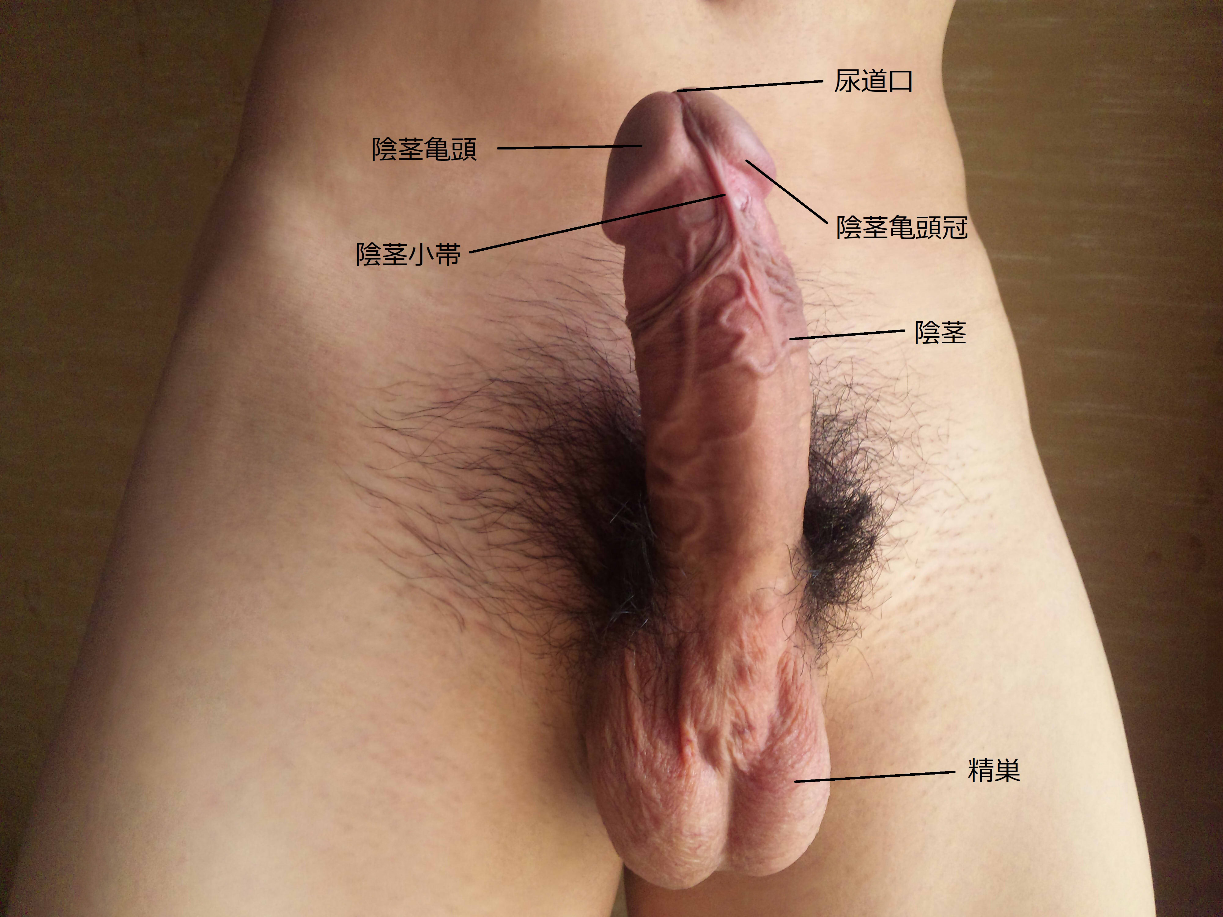 human_penis